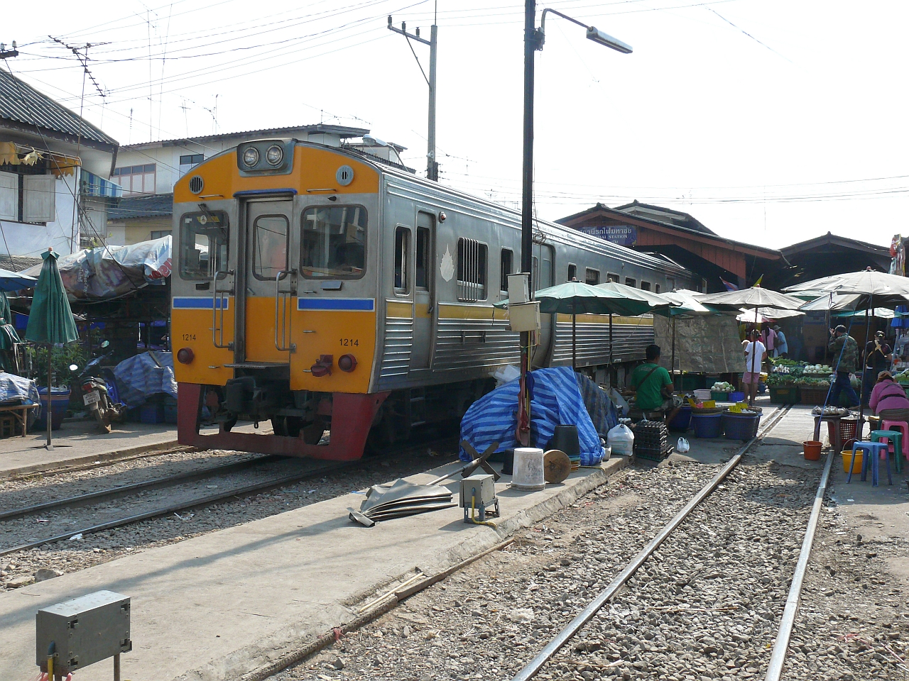 Samut Sakhon, 09.03.2010